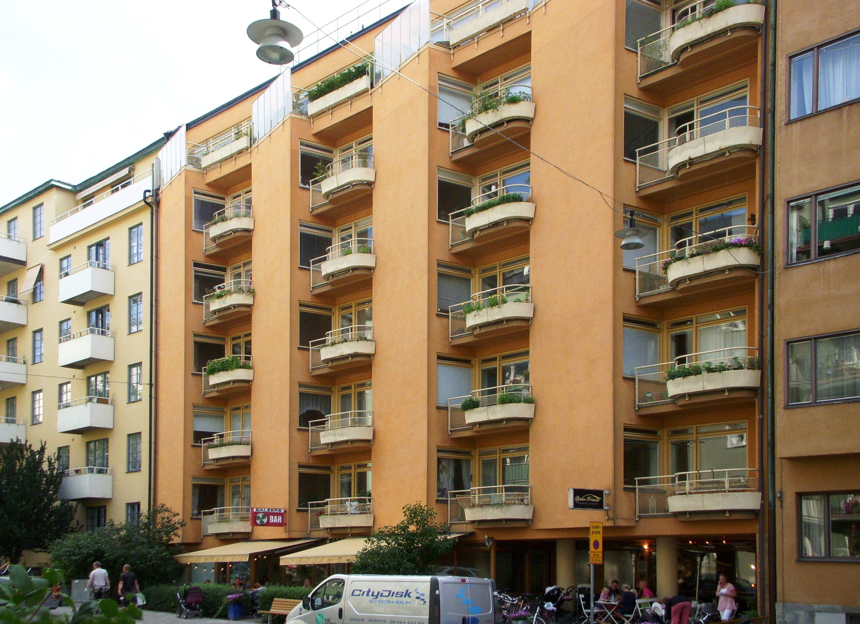 Sven Markelius kollektivhus, John Ericssonsgatan 6 på Kungsholmen